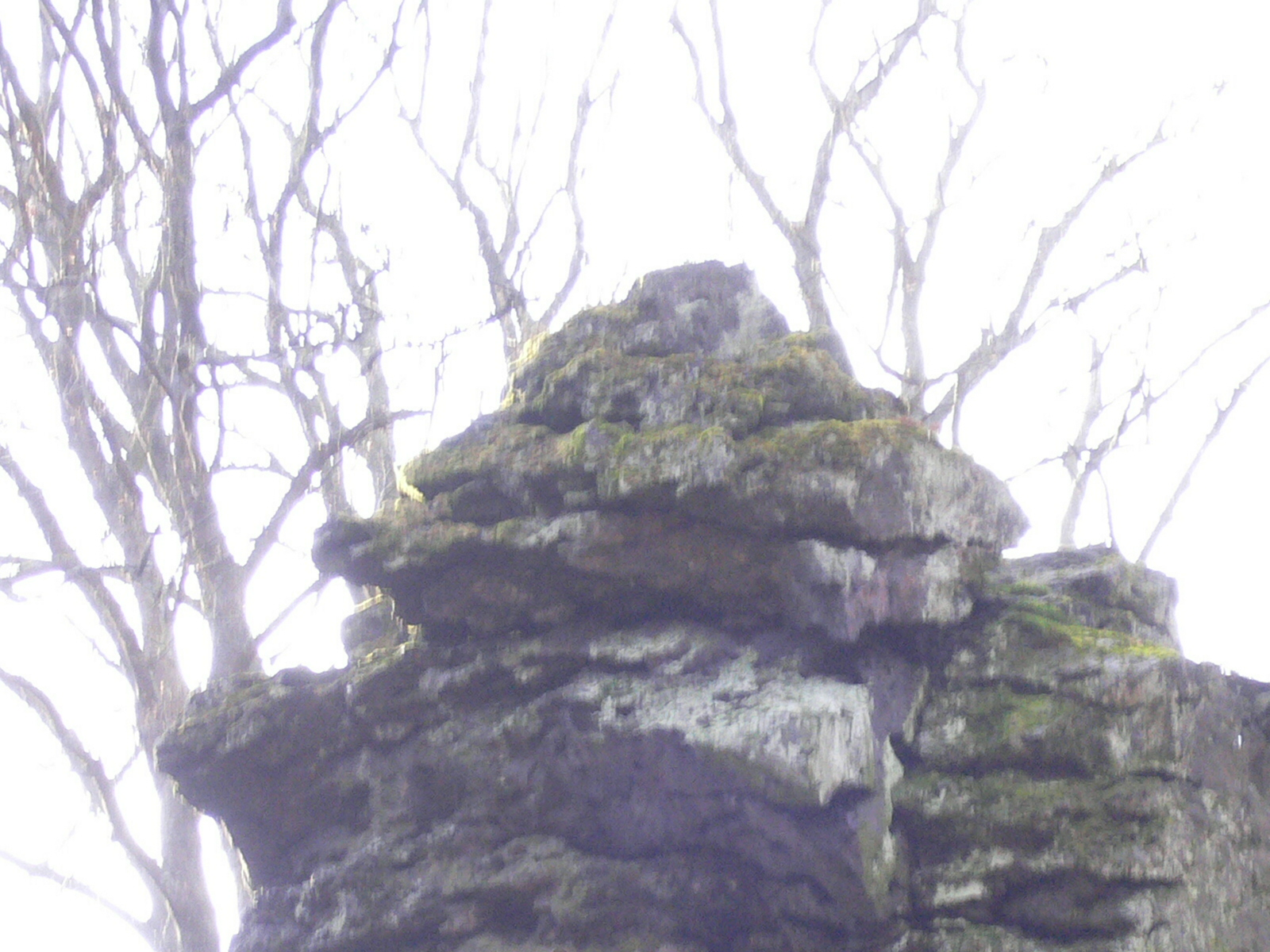 Wilhelmsteine: Skulptur am hohen Stein, Gesicht mit Kinnbart